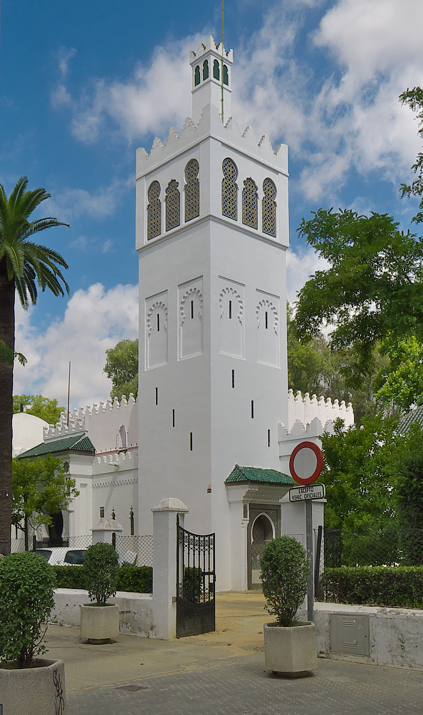 Torre del edificio en forma de alminar con altura de treinta metros